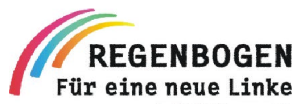 Logo des Regenbogens